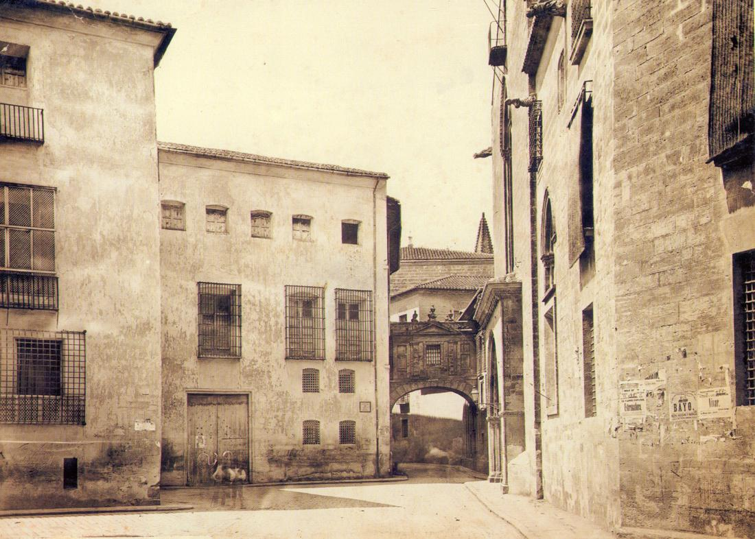 Fragment del Palau Arquebisbal (abans de ser enderrocat durant la Guerra Civil) i Porta de l'Alomina de la catedral de València. Foto de Jean Laurent (1816-1886) cap el 1870.